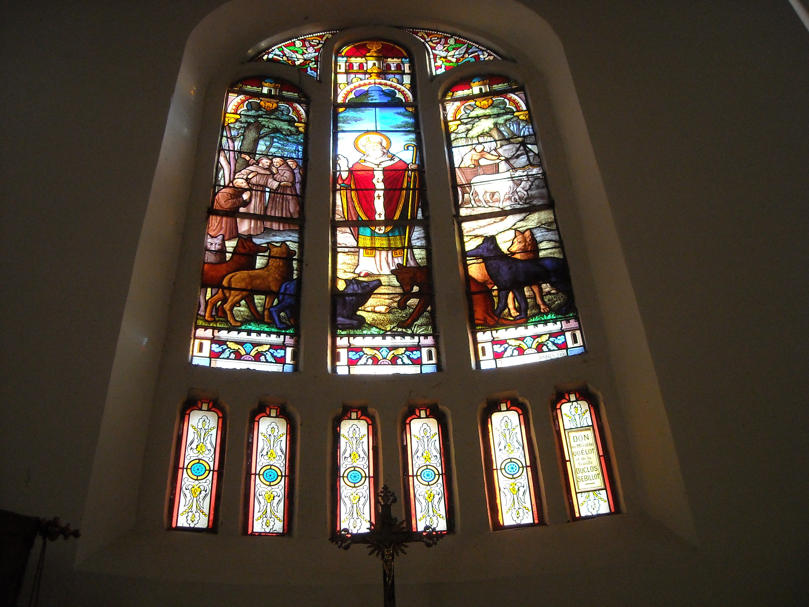 Vitralo de la preĝejo Sankta Briego de Mauron: La Sanktulo pacigas la lupojn